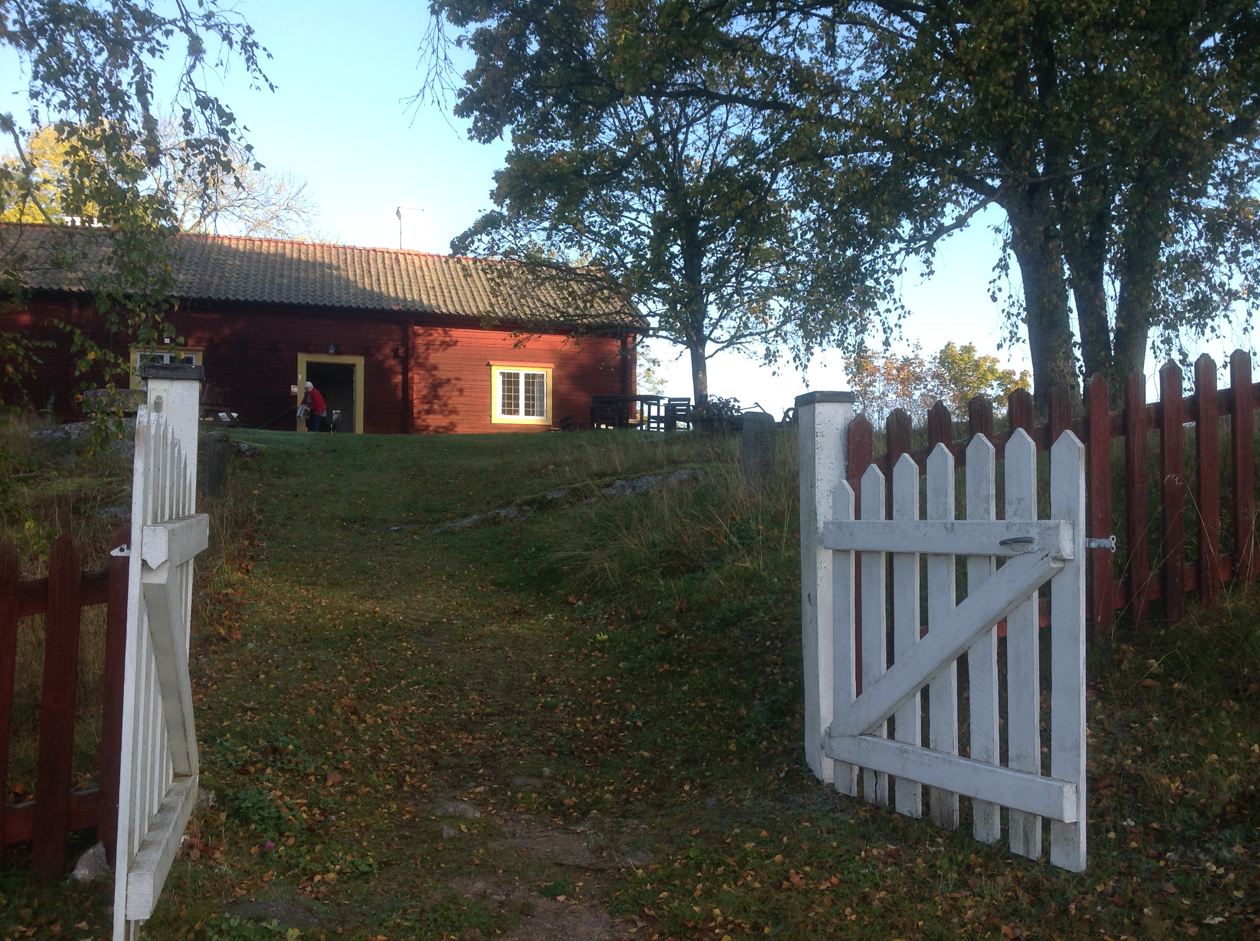 Risinge Hembygdsgård belägen på kullen bredvid Sankta Maria kyrka i Risinge